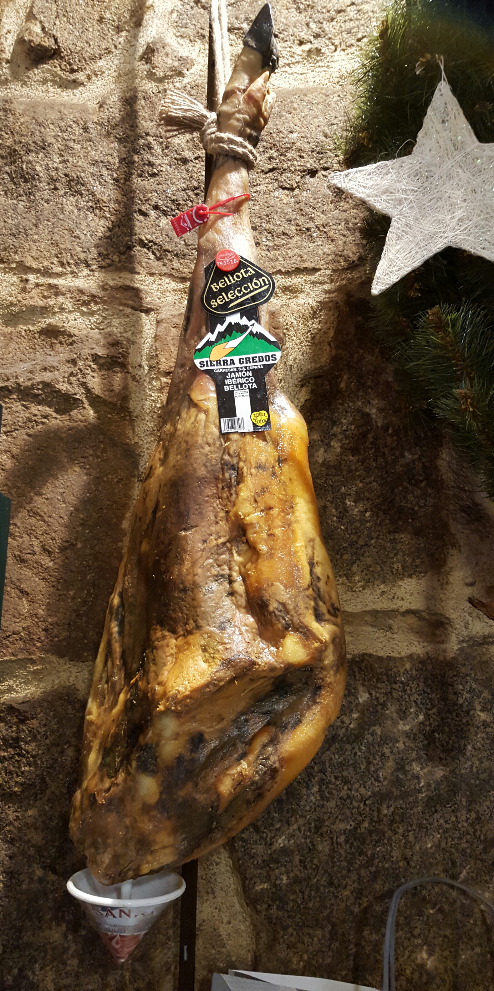 Jamón de bellota, Muñana Ávila, España